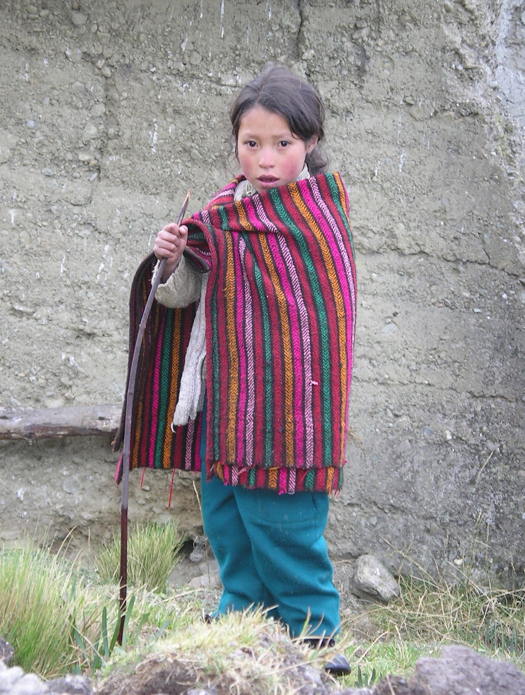 Peruan child, puna of La Union, Huanuco department, Peru.